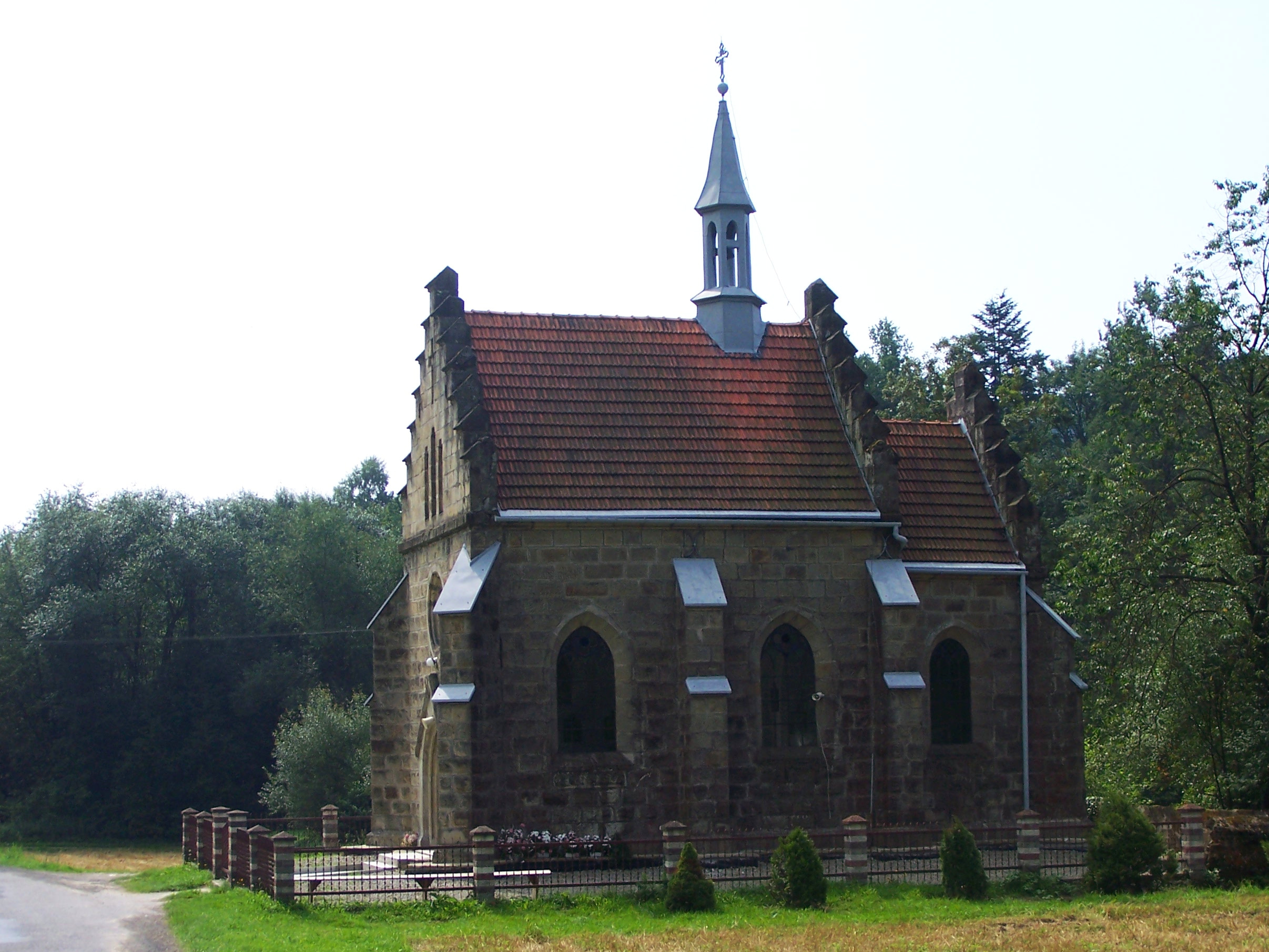 Kamionka Mała. Kaplica Matki Boskiej Szkaplerznej w przysiółku Maliniska